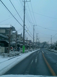 平成17年豪雪時の布佐平和台4丁目付近から南公園方面を望む